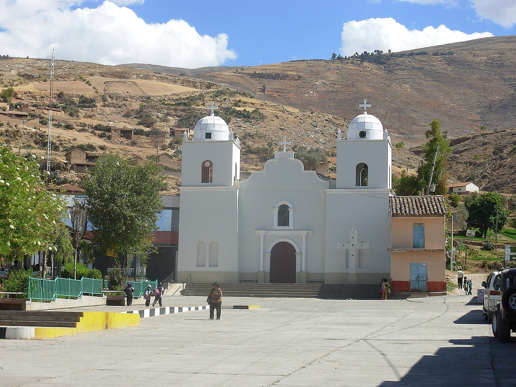 Ahuac, Templo catolico